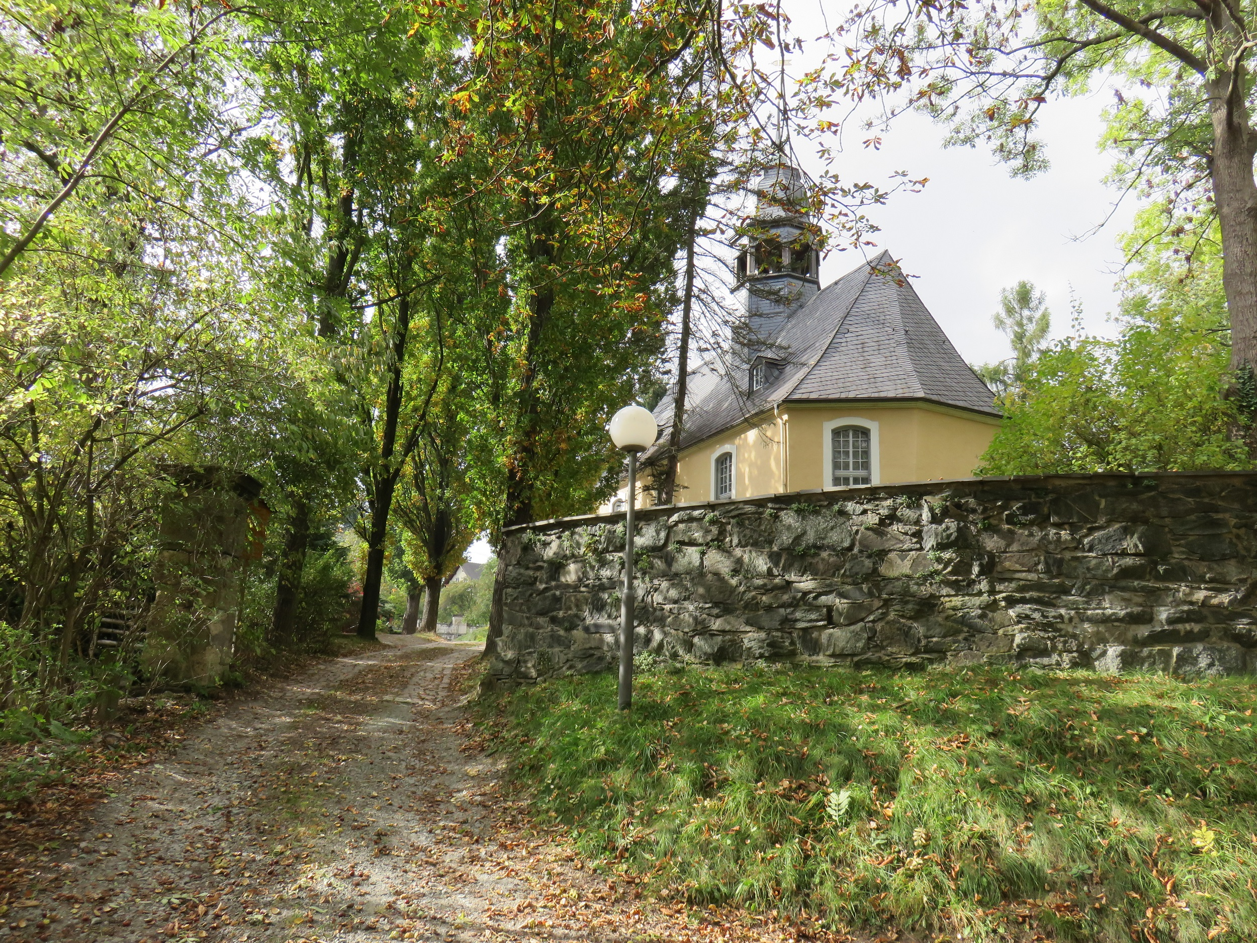 Sachgesamtheit Evangelisch-Lutherische Kirche Chemnitz-Harthau.